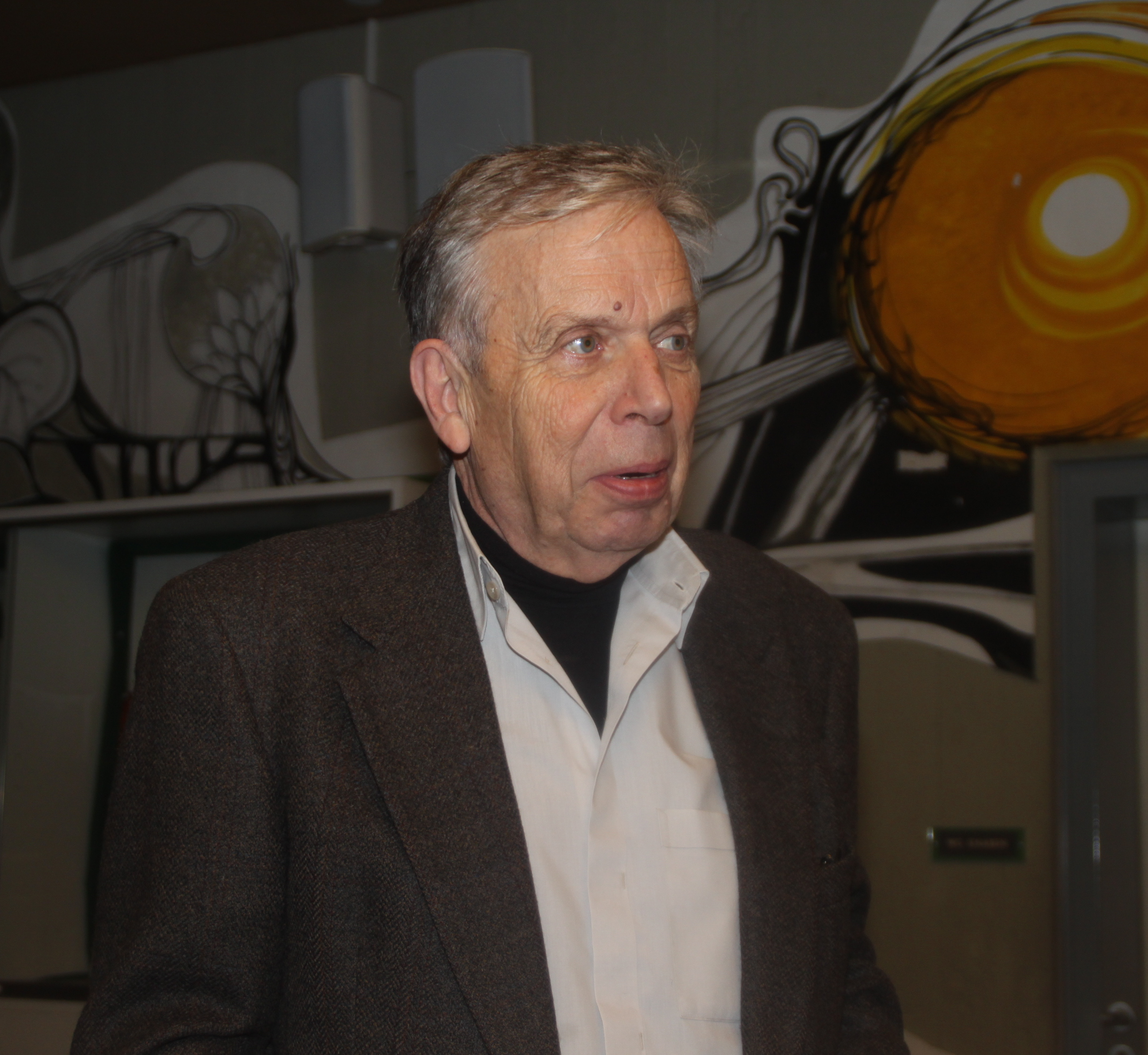 Walter Oelert bei einem öffentlichen Vortrag